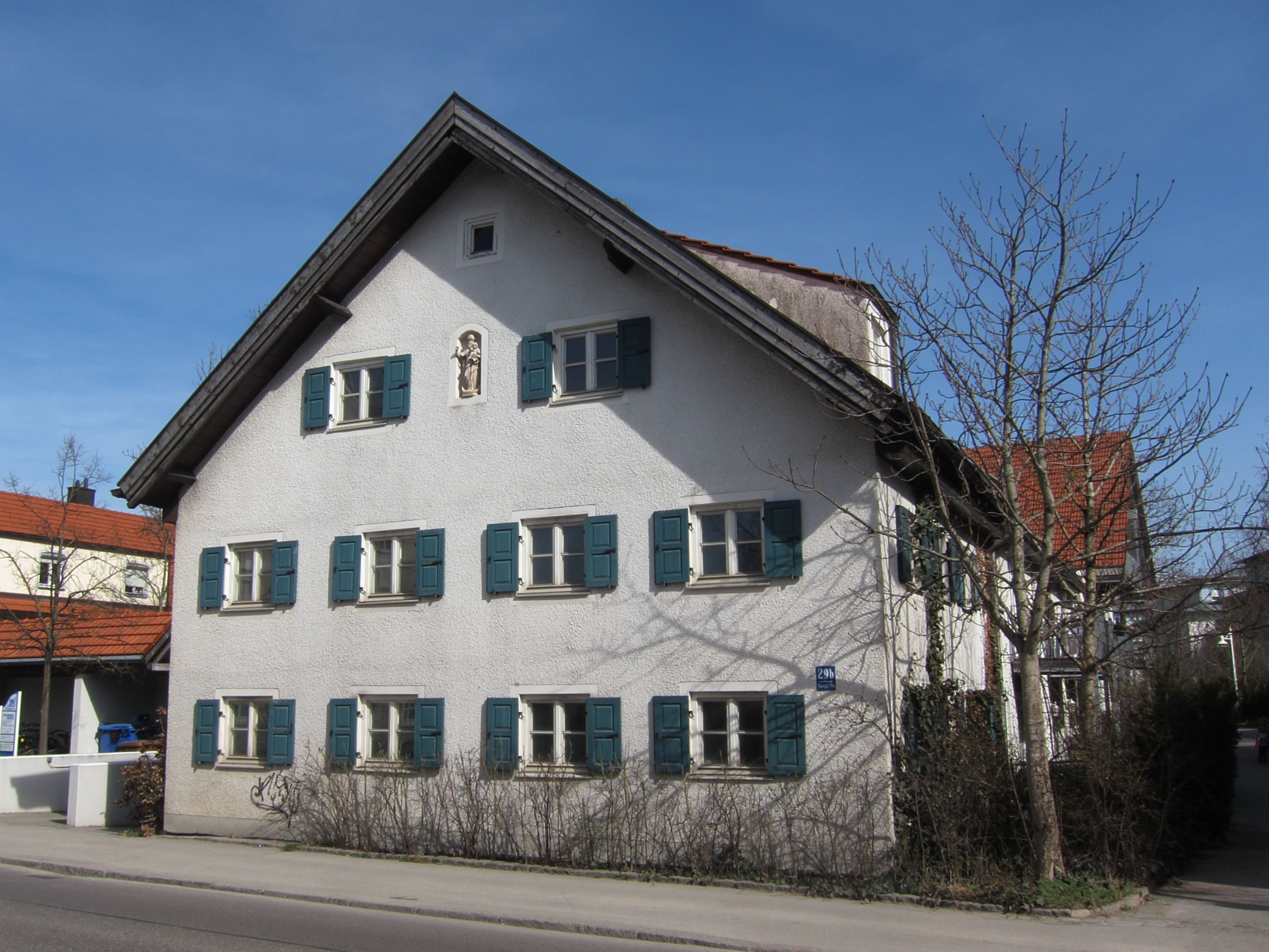 Planegger Straße 29; Bauernhaus, wohl 1. Hälfte 19. Jh.